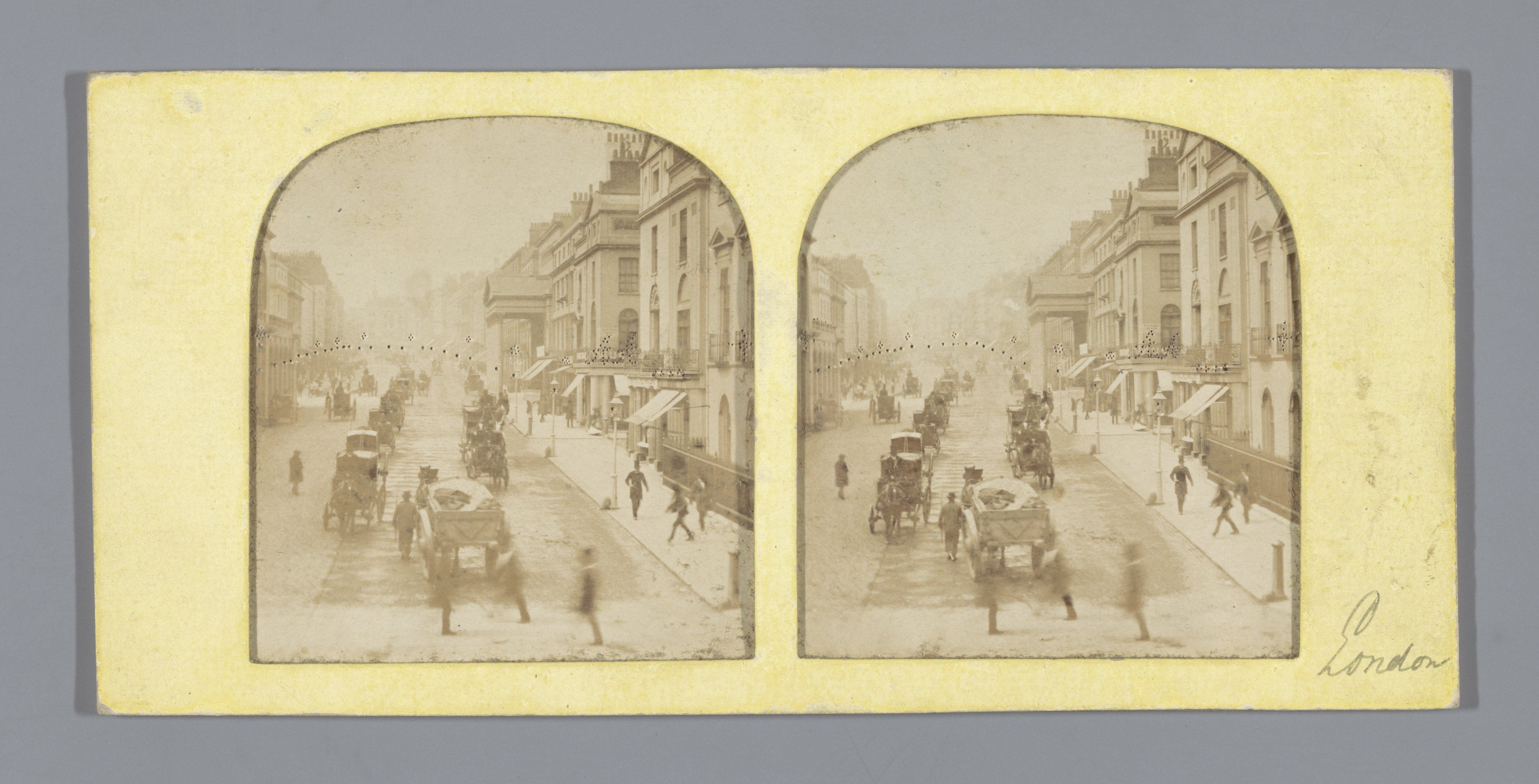 IdentificatieTitel(s): Straatbeeld in LondenLondon Illuminations at the Prince of Wales' Marriage (titel op object)Objecttype: stereofoto (tissue) Objectnummer: RP-F-F09277Opschriften / Merken: opschrift, recto rechtsonder, handgeschreven: ‘Londen’nummer, verso links, handgeschreven: ‘No. 2’nummer, verso midden, handgeschreven: ‘3’opschrift, verso rechtsonder, JFPwinkeliersmerk, verso links, gestempeld: ‘Nolet & Zoon/ Utrecht’, Vervaagd maar vergelijkbaar aan andere objecten.VervaardigingVervaardiger: fotograaf: anoniemPlaats vervaardiging: LondenDatering: 1855 - 1863Fysieke kenmerken: geperforeerde albuminedruk, geplakt op met de hand gekleurd transparant papier; tussen kartonMateriaal: fotopapier papier karton Techniek: albuminedruk / met de hand kleuren / perforerenAfmetingen: secundaire drager: h 81 mm × b 168 mmOnderwerpWat: streeturban housingWaar: LondenVerwerving en rechtenVerwerving: overdracht van beheer 1994Copyright: Publiek domein